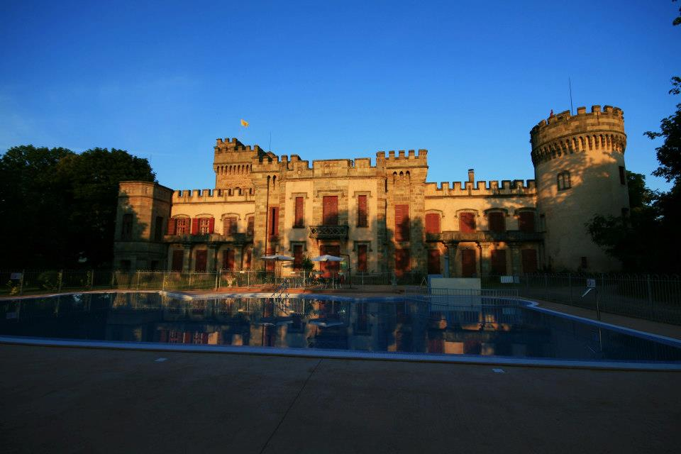 aile est (et non pas ouest) du château de la grange fort au coucher du soleil